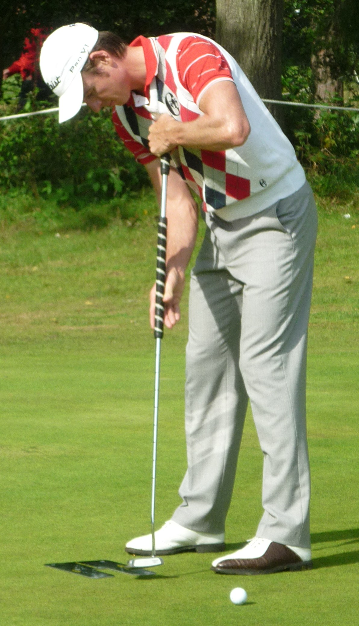 Brett Rumford met lange putter